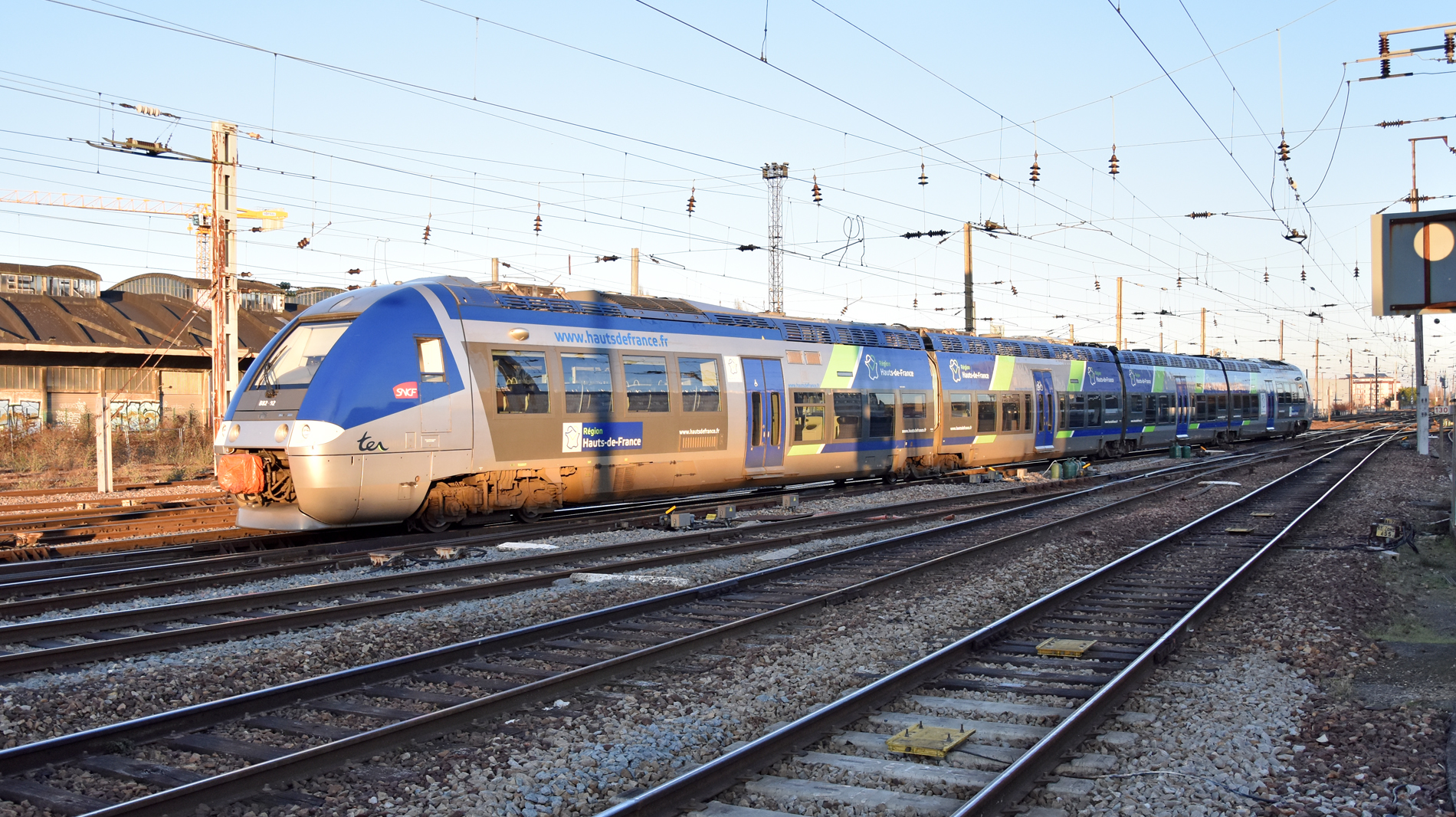 B 82691/92 à Amiens